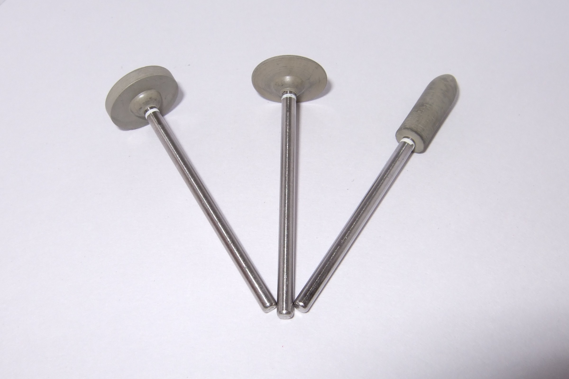 Chhiūⁿ-ni phau-kng lían-á kap lia̍p-á